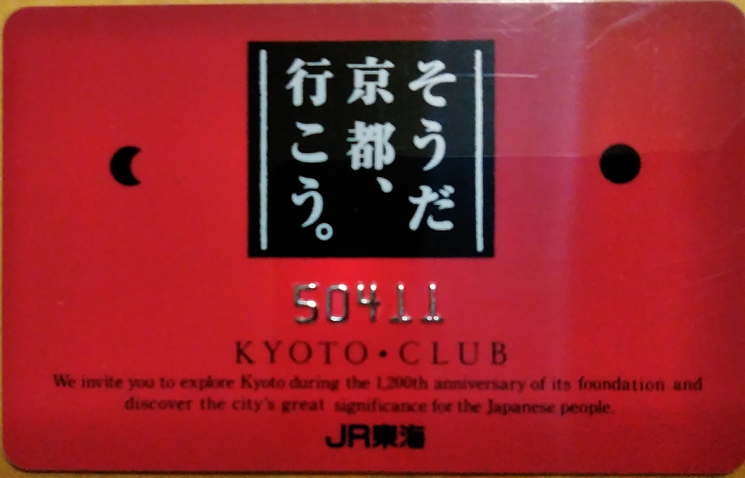 JR東海「そうだ、京都行こう」の京都クラブ会員証